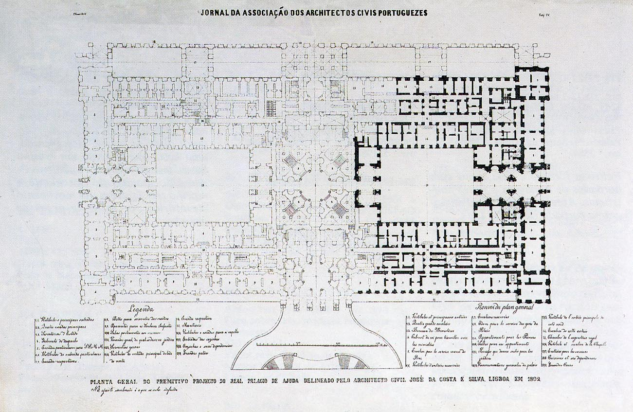 PLANTA GERAL DO PRIMITIVO PROJECTO DO REAL PALACIO DA AJUDA